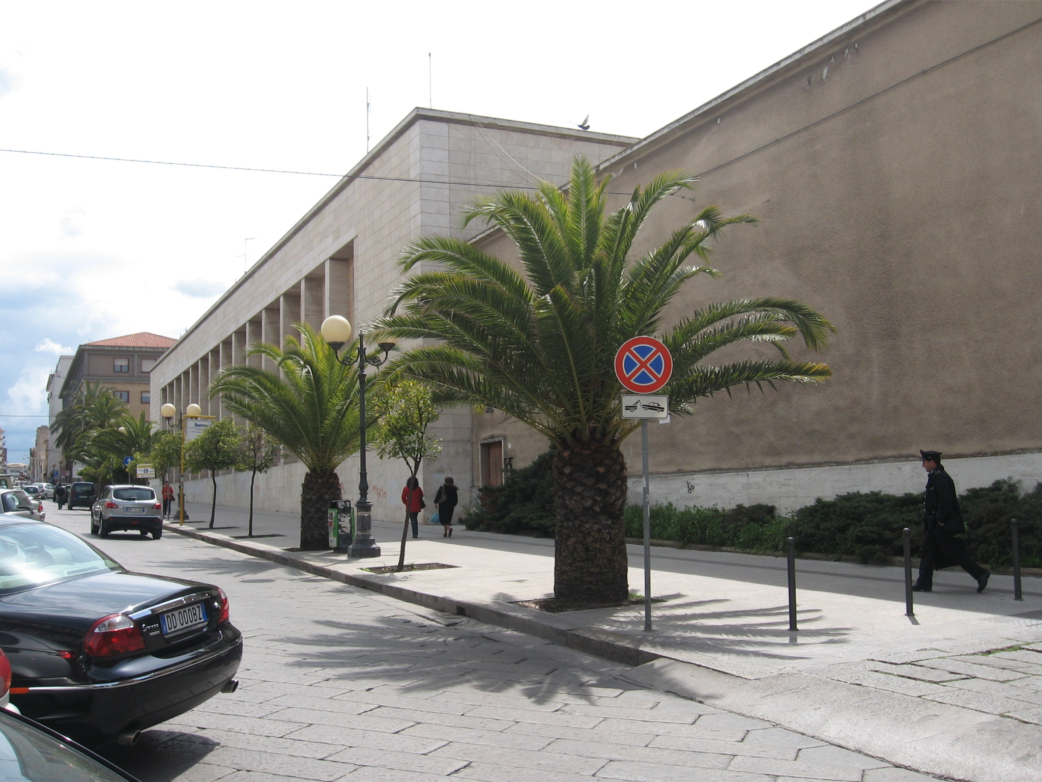 Tribunale and jail, Sassari.